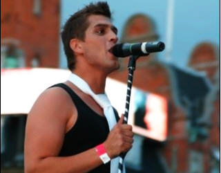 Rudi Køhnke, forsanger i Robbie Williams Experience. Taget på Rådhuspladsen i København